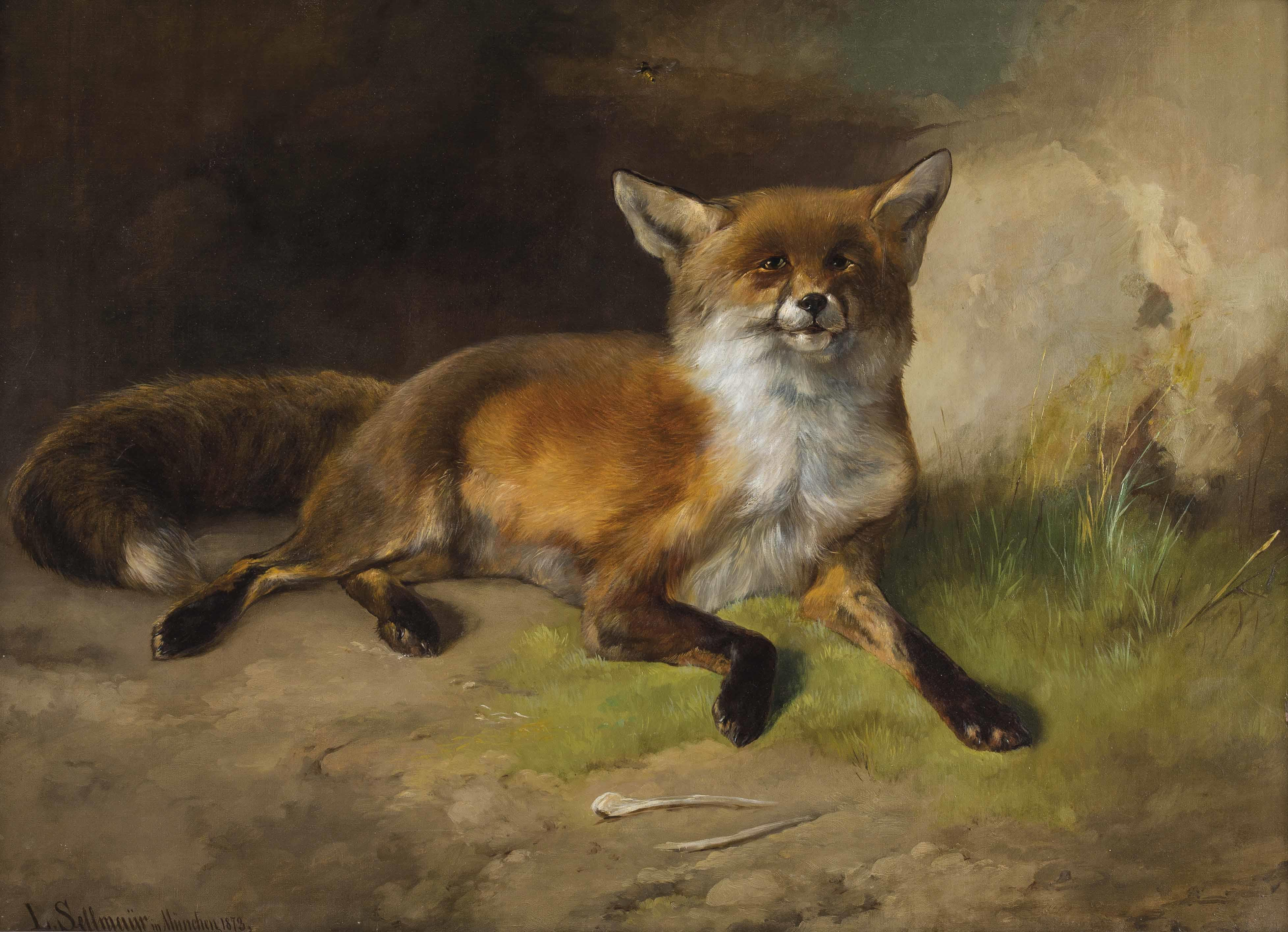 Fuchs und Wespe, signiert und datiert unten rechts: L. Sellmayr in München 1873, Öl auf Leinwand, ca. 66 x 89 cm